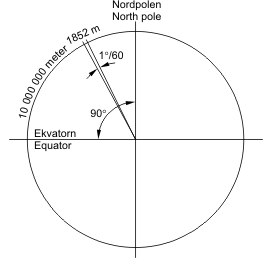 Nautical mile definition